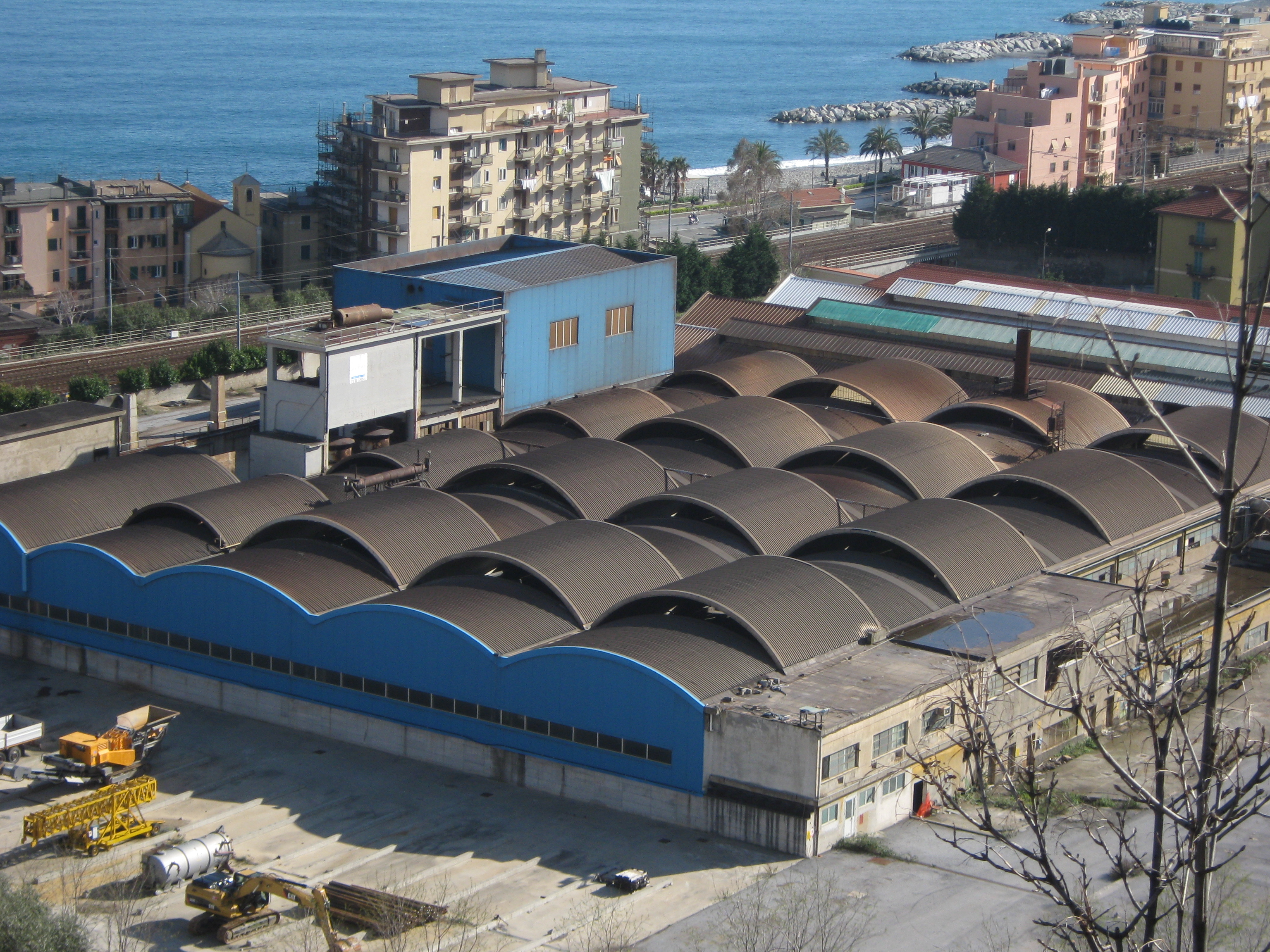 Area ex-stabilimento industriale TubiGhisaSpA a Cogoleto